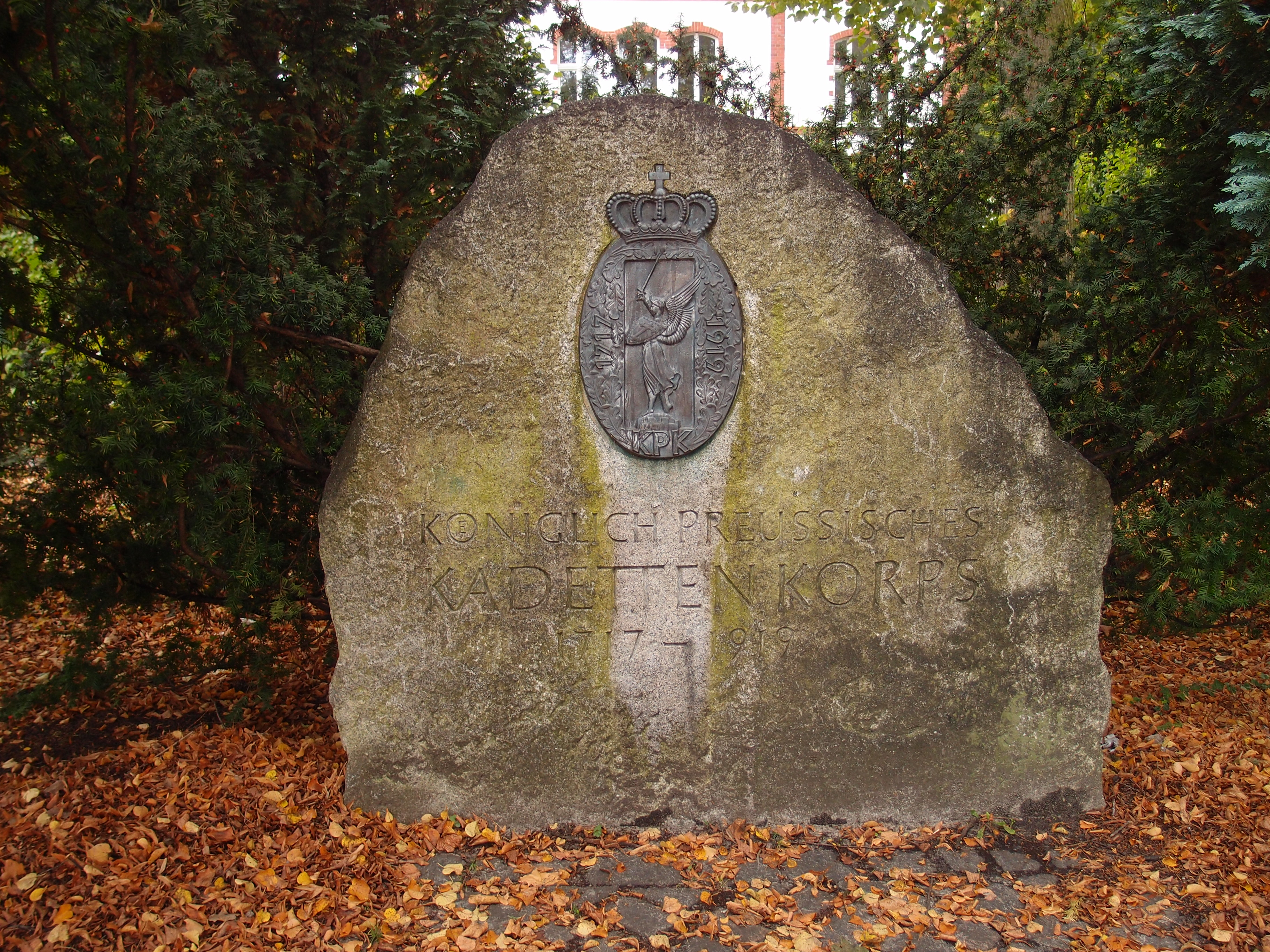 Gedenkstein für das „Königlich Preußische Kadettenkorps“ in Berlin, Kadettenweg Ecke Paulinenstraße.